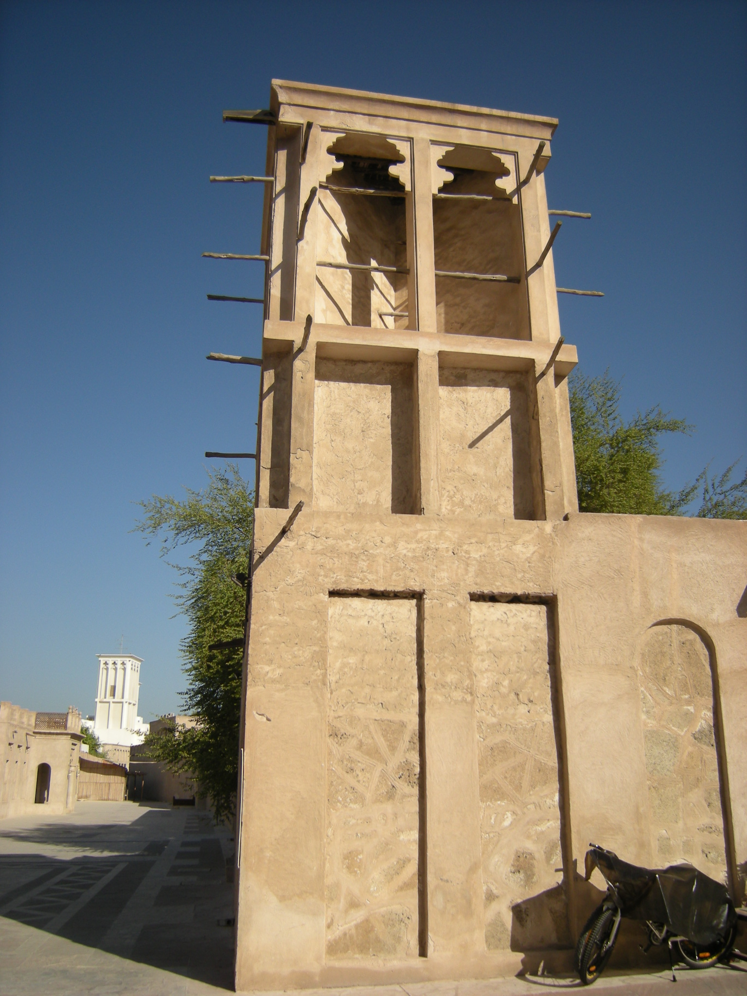 Quarteirão antigo de Dubai